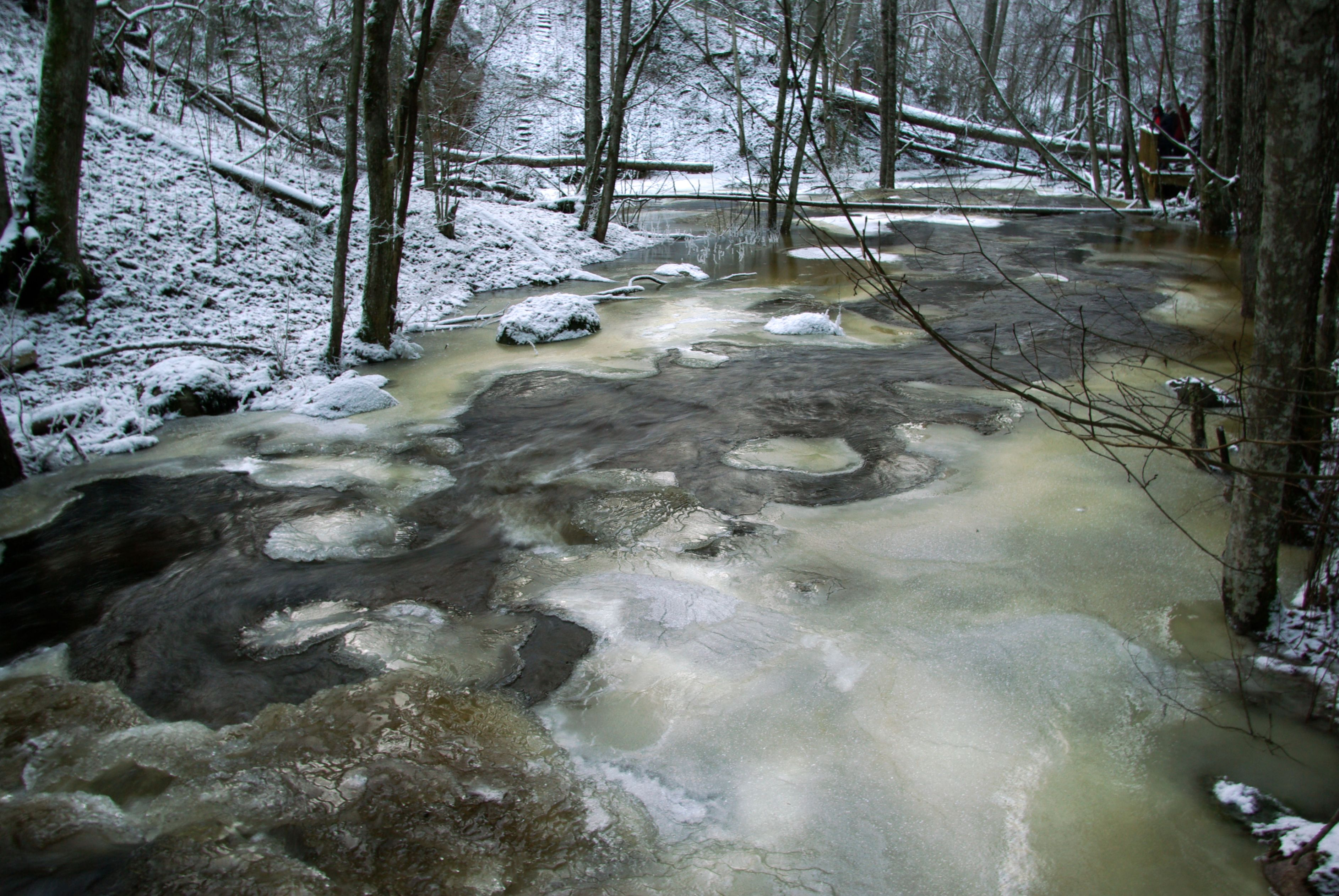 Õisu maastikukaitseala